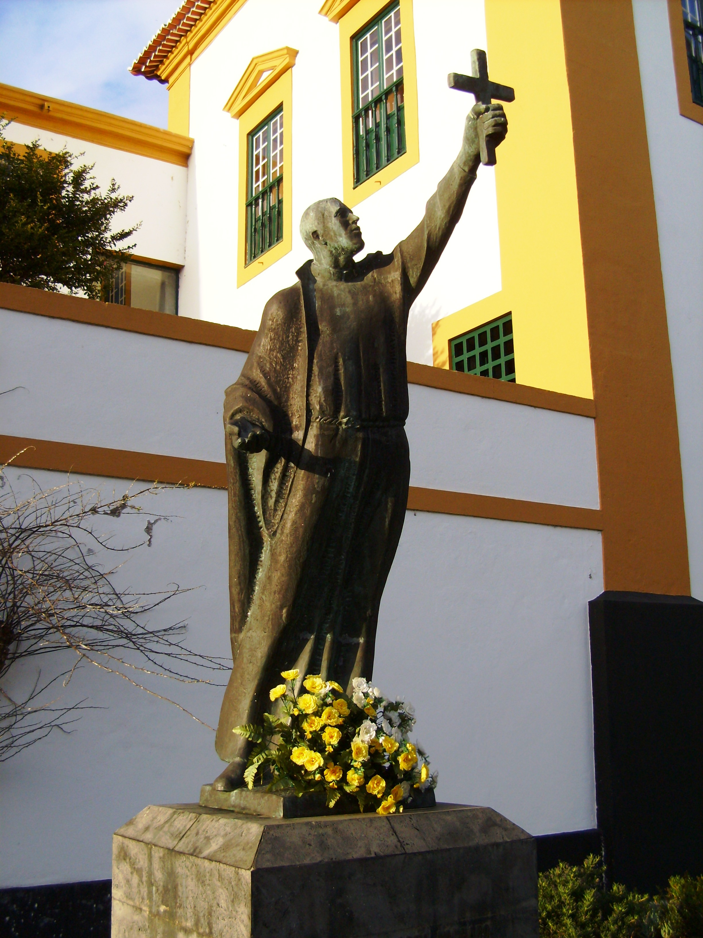 Monumento ao Beato [padre João] Baptista Machado, mártir do Japão, no centro histórico de Angra do Heroísmo, ilha Terceira, Açores. Escultura em bronze de autoria de Álvaro Raposo de França, 1988.